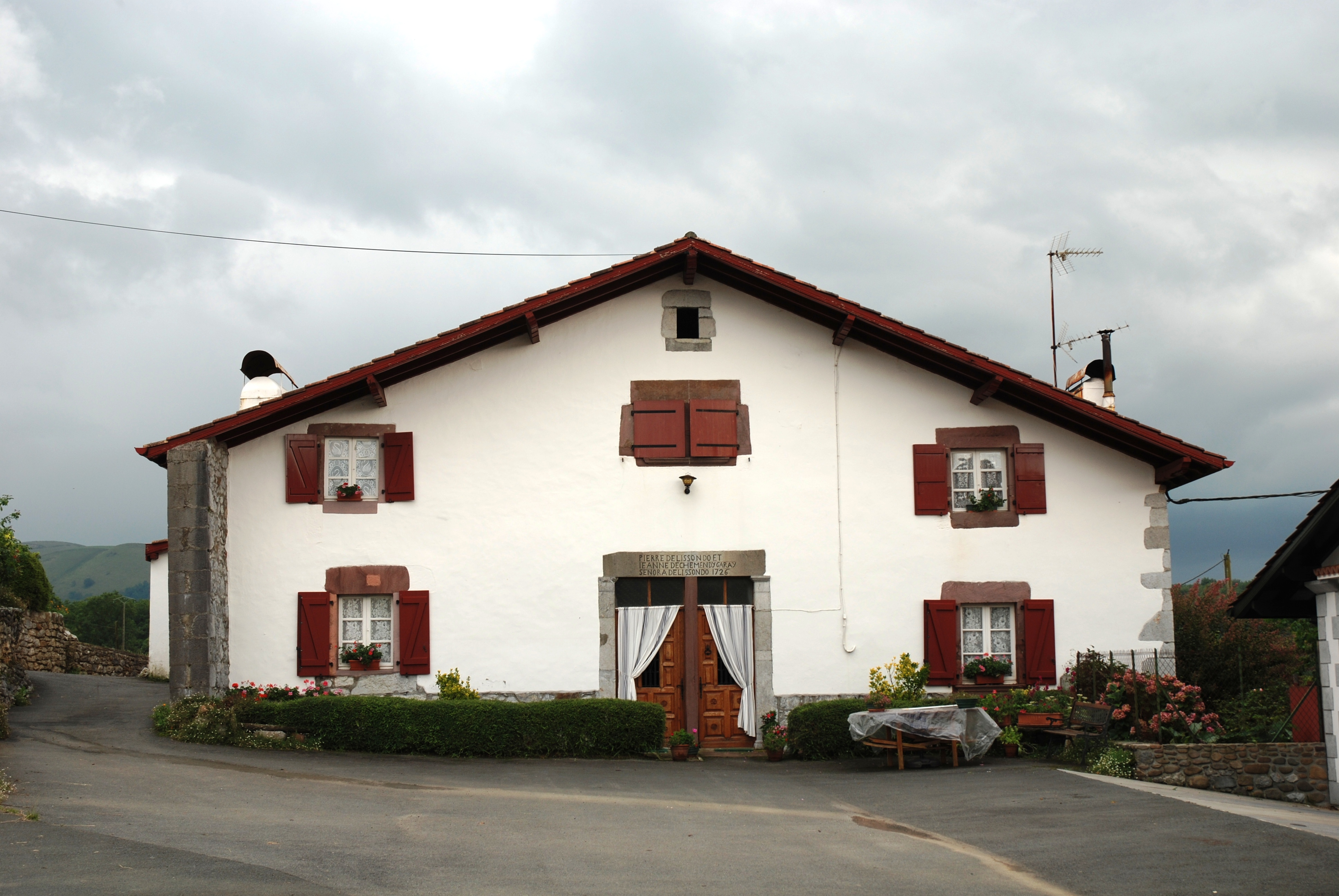 Jaxu, maison de Basse-Navarre